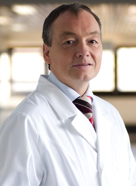 Micheal Truß